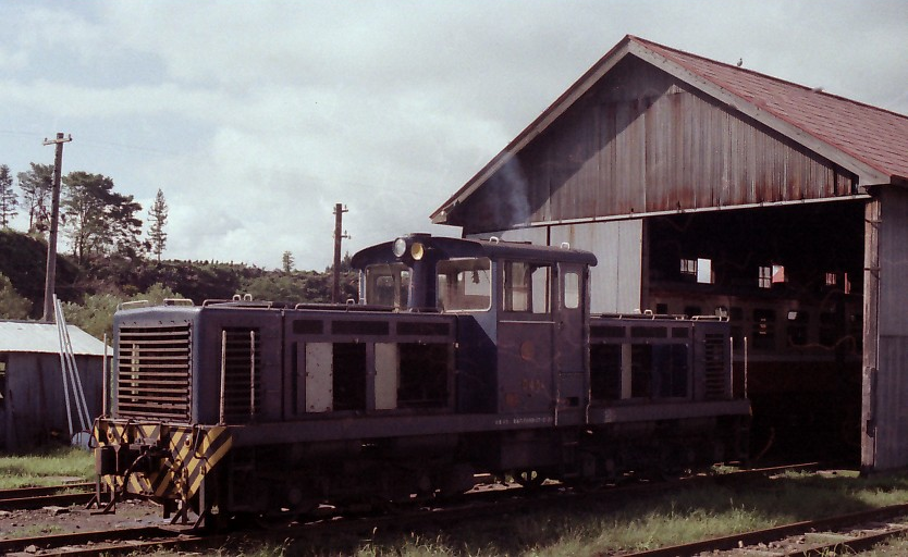 旧・南部縦貫鉄道線のディーゼル機関車、D45。七戸の車庫にて。